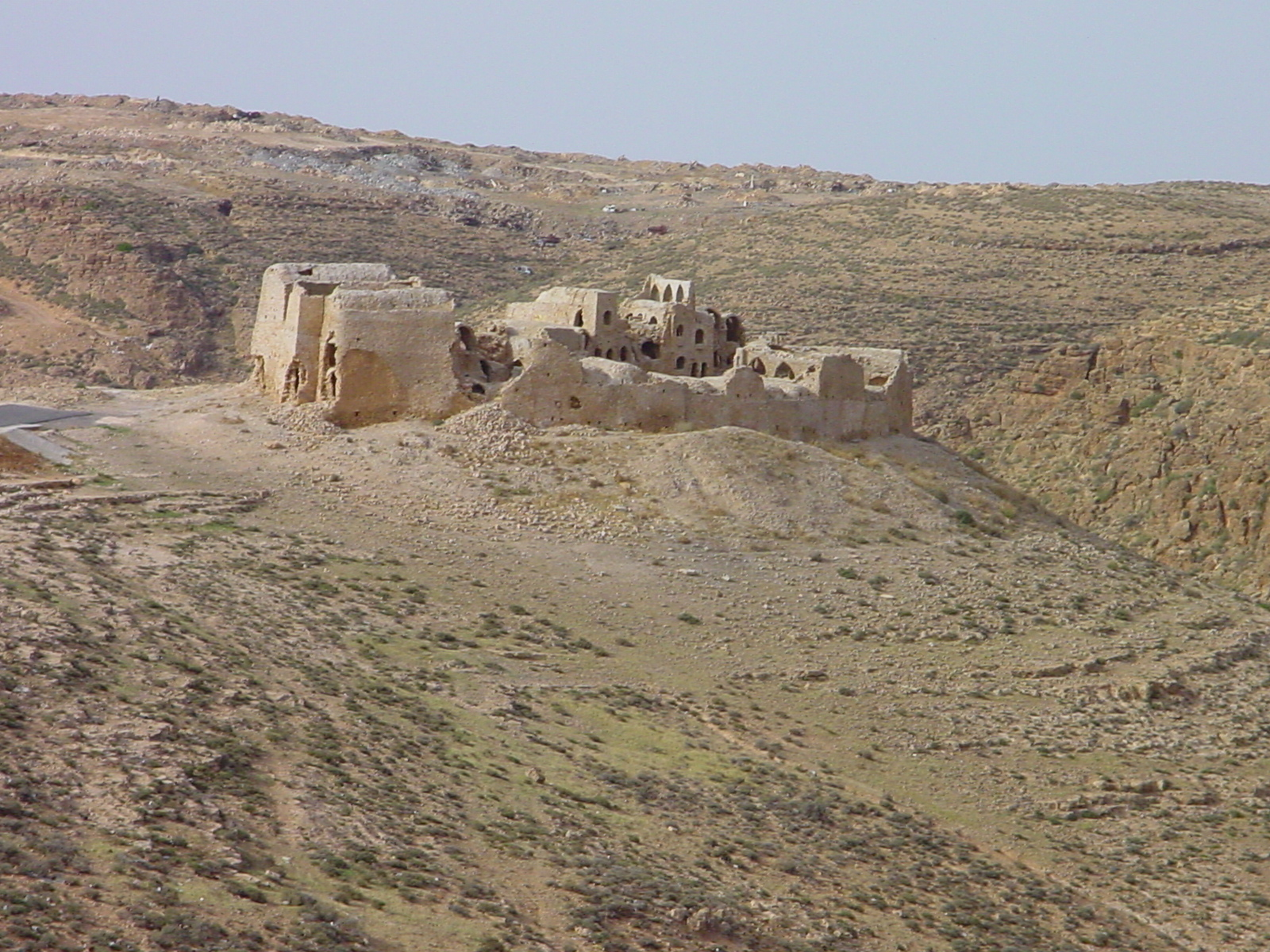 هده صوره من تصويرى من عين المكان بكاميرتى sony dsc p50